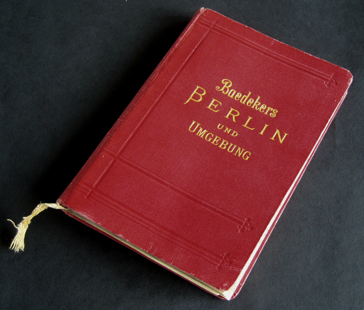 Baedekers Berlin, Reiseführer von 1910, 19. Auflage